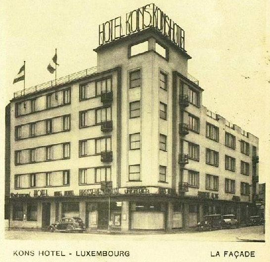 Luxembourg, place de la Gare. L'ancien Hôtel Kons, vers 1939.